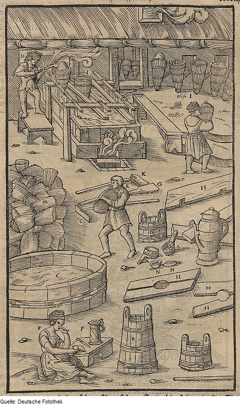 Original image description from the Deutsche Fotothek Bergwerk & Bergbau & Salzgewinnung